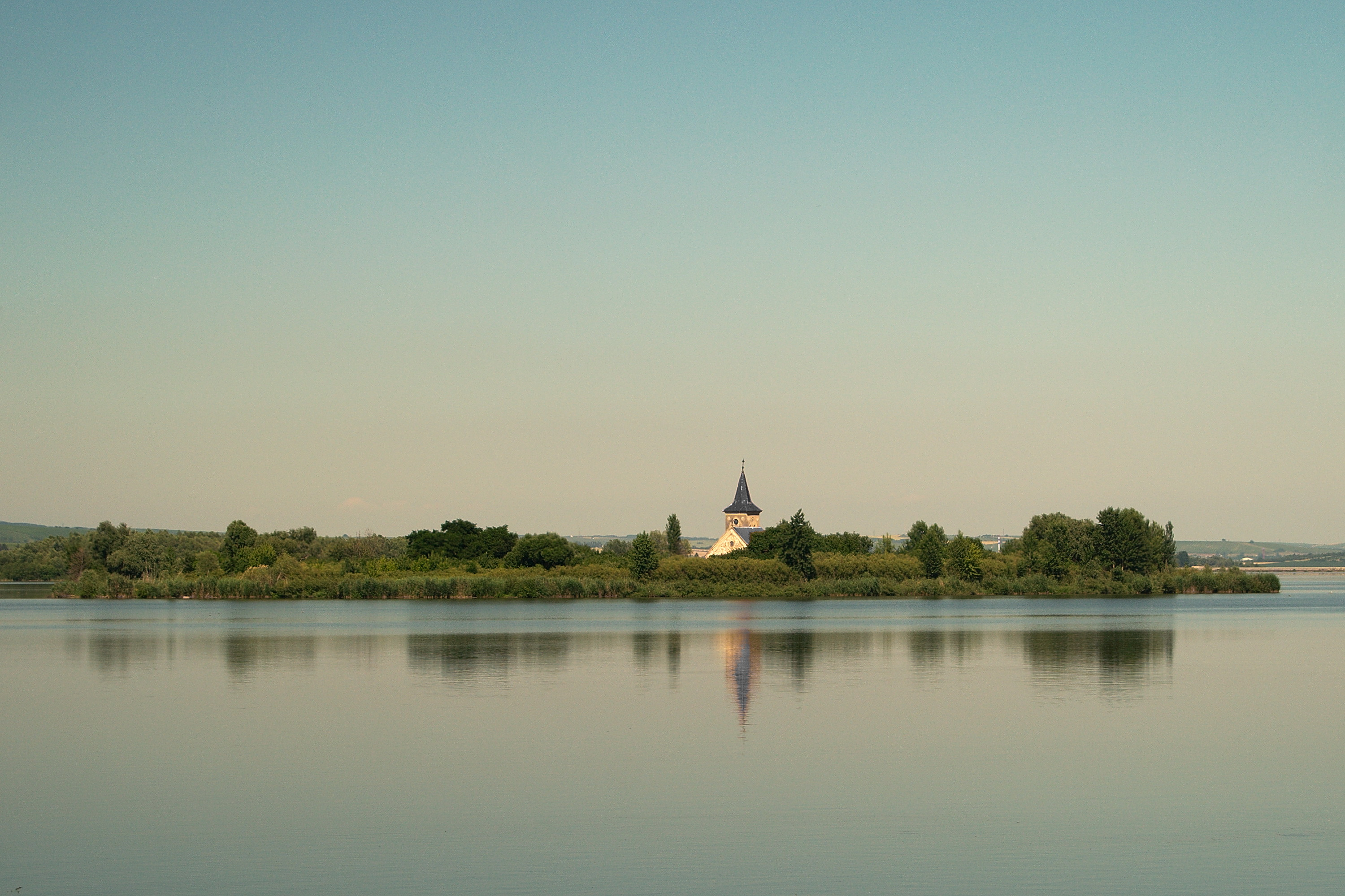 Mušov - ostrůvek s kostelem sv. Linharta